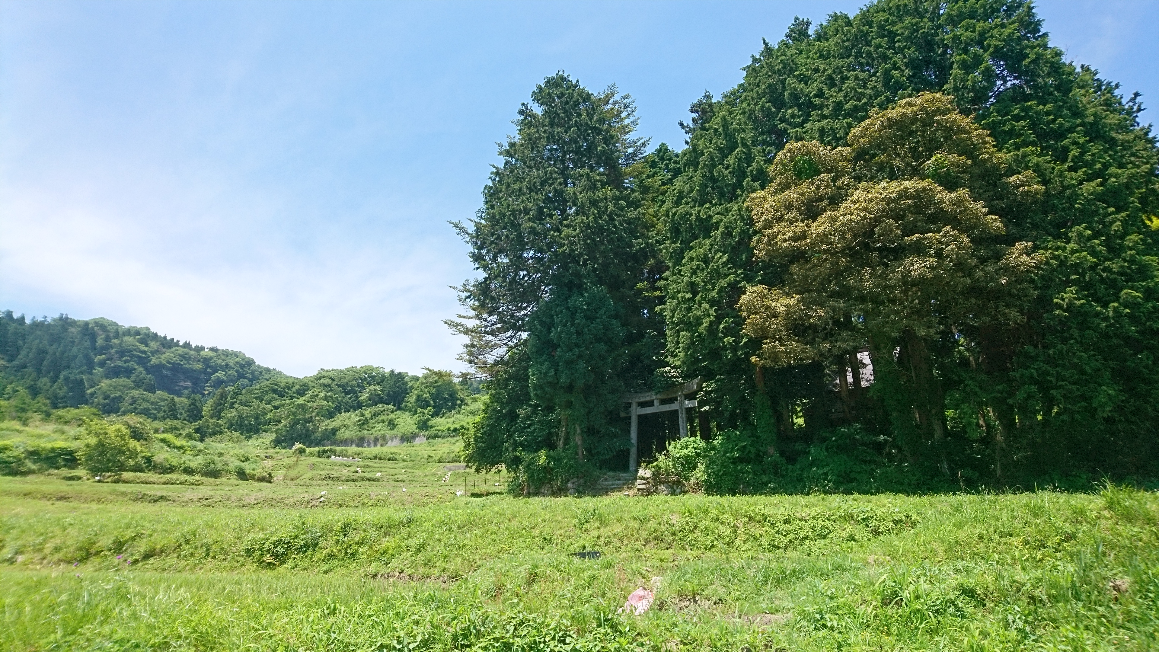 棚田のなかに佇む世屋姫神社（宮津市世屋地区）